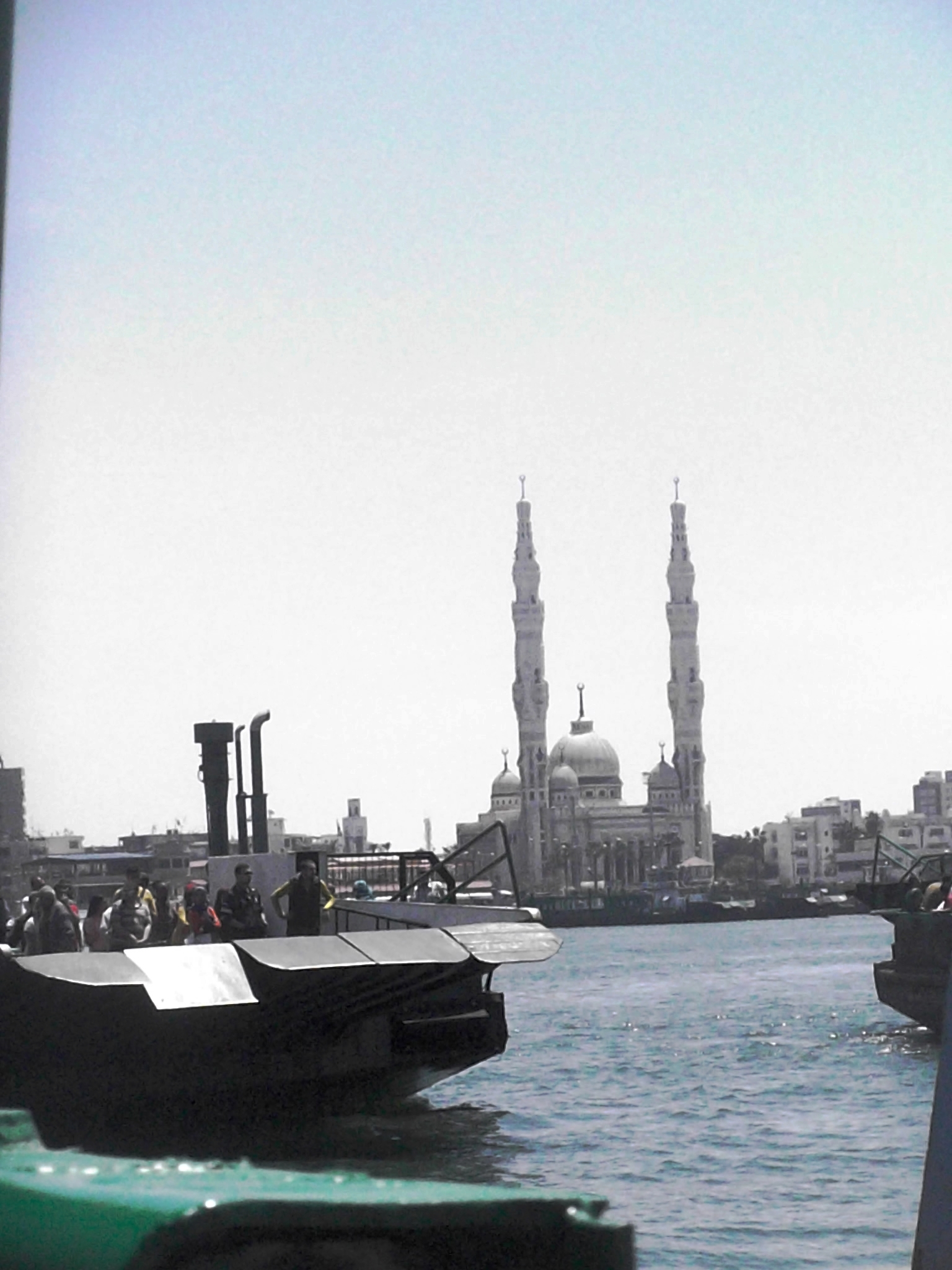 مدخل قناة السويس عند بورفؤاد والمجمع الإسلامي.